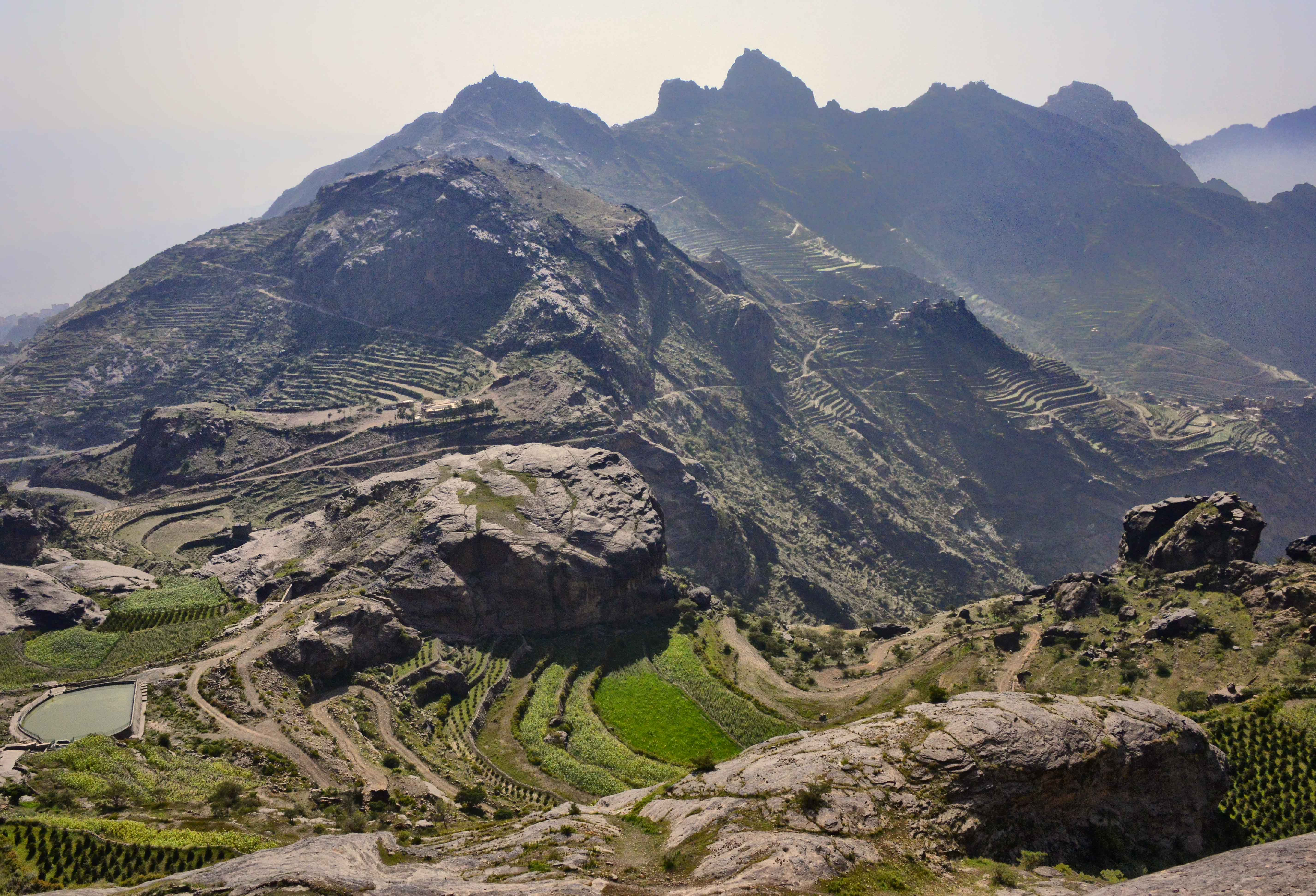 Yemen Highlands